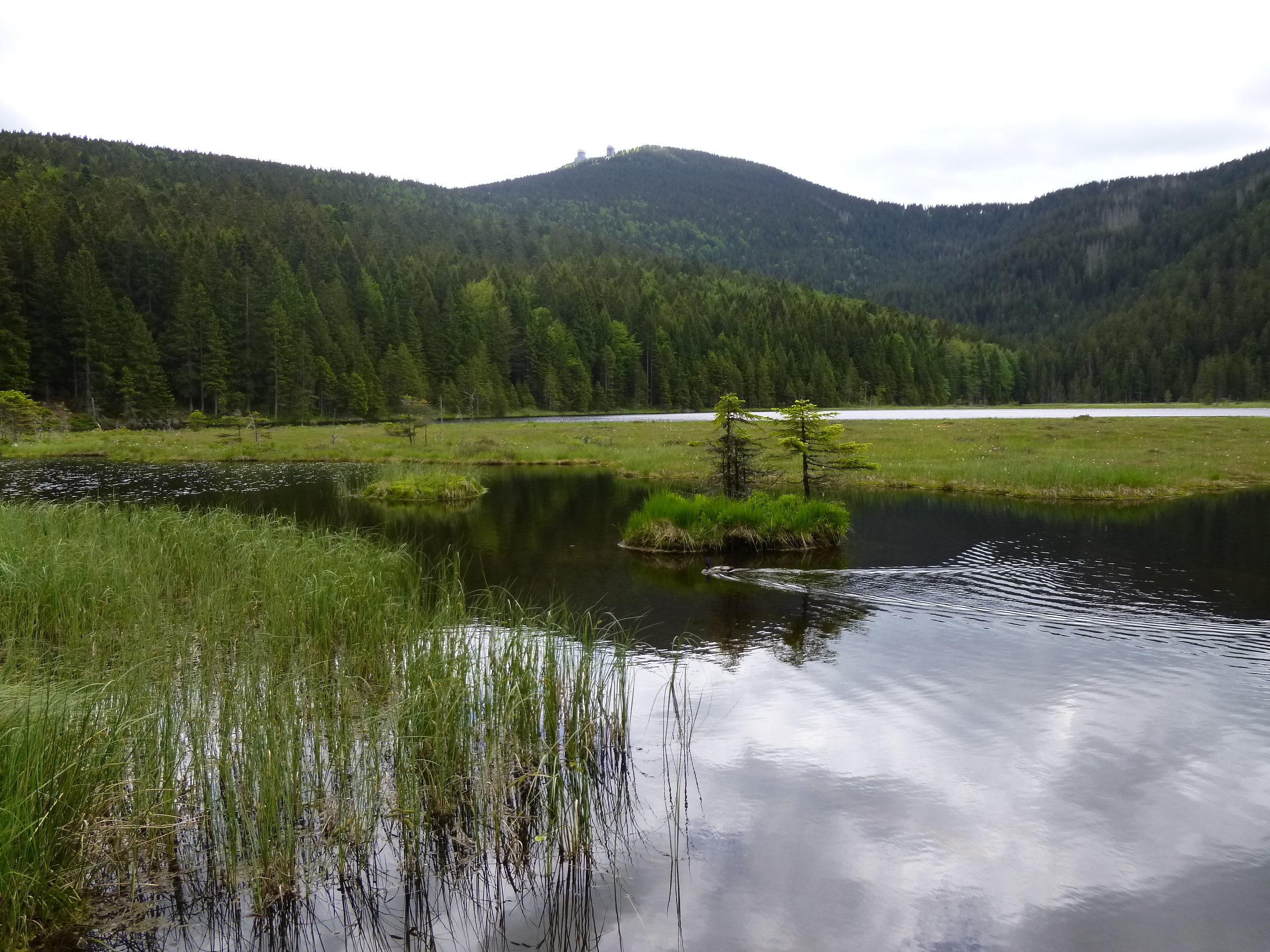 Kleiner Arbersee (NSG) mit Blick zum Arbergipfel